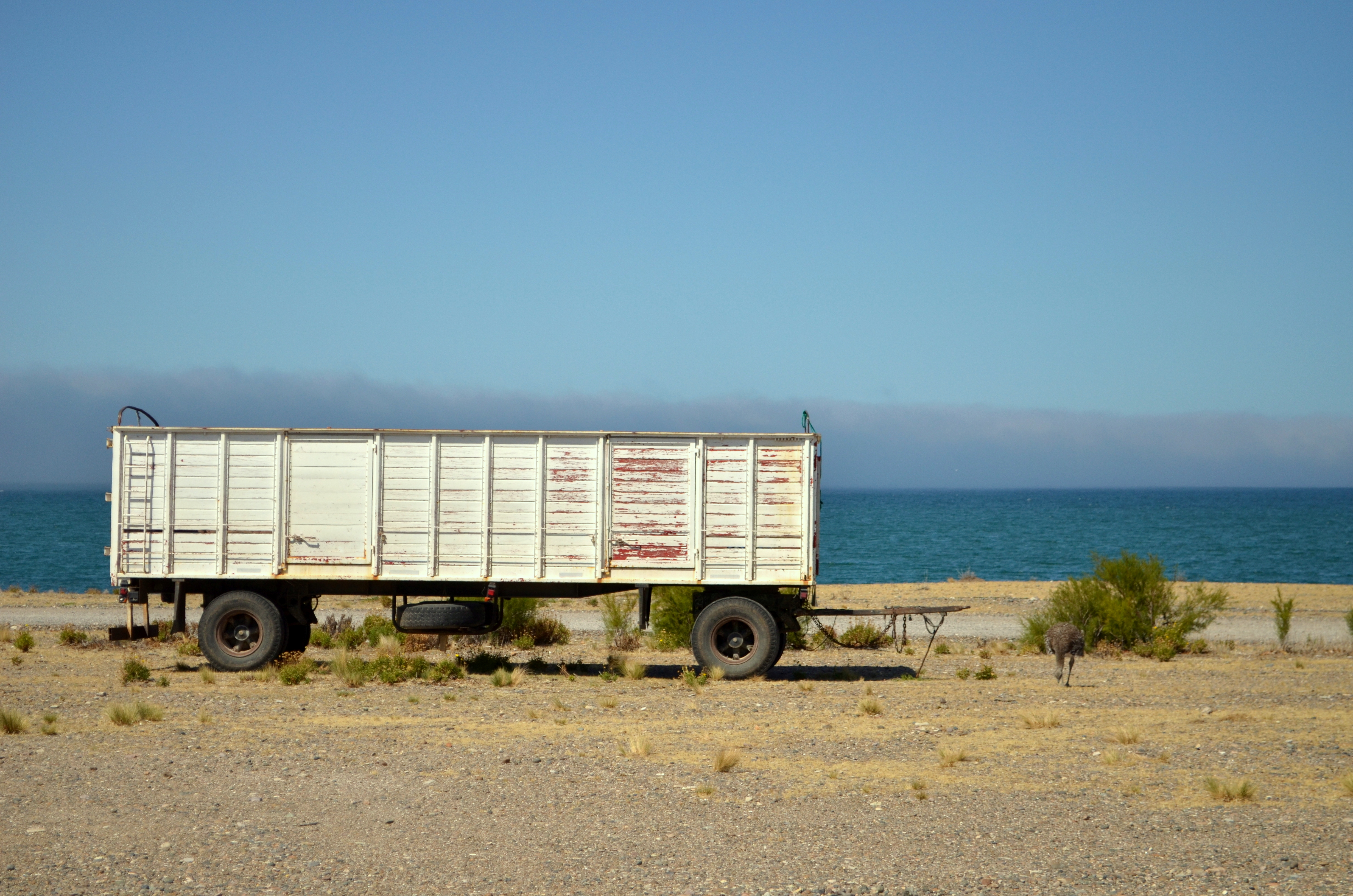 Bahía Bustamante - Chubut - Patagonia Argentina